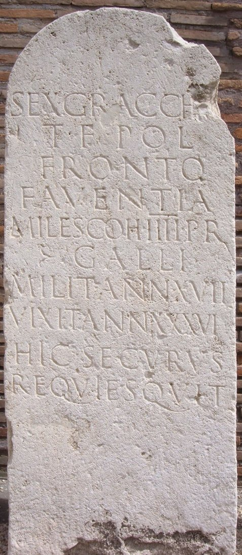 Graf van Sextus Gracchius Fronto, miles in het IVe cohort van de praetoriaanse garde. April 2005, Museo Epigrafico, Rome. Reference: AE 1966, 0033